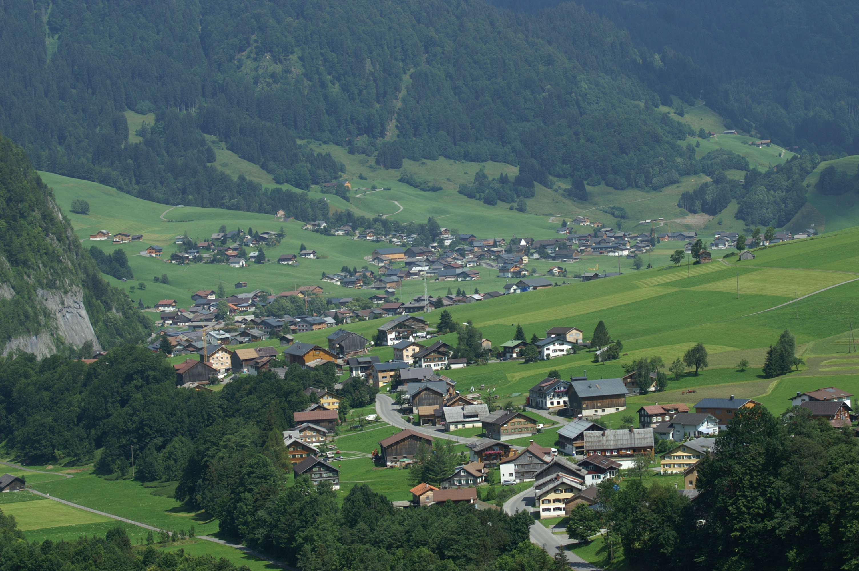 Au, mit den Ortsteilen Rehmen, Argenzipfel - Blick von der Faschina Straße (L193).